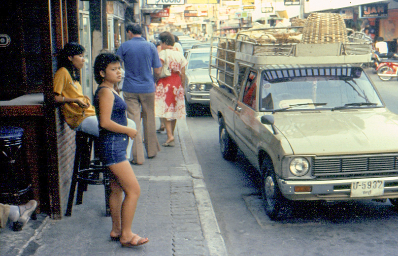 Street view, Bangkok